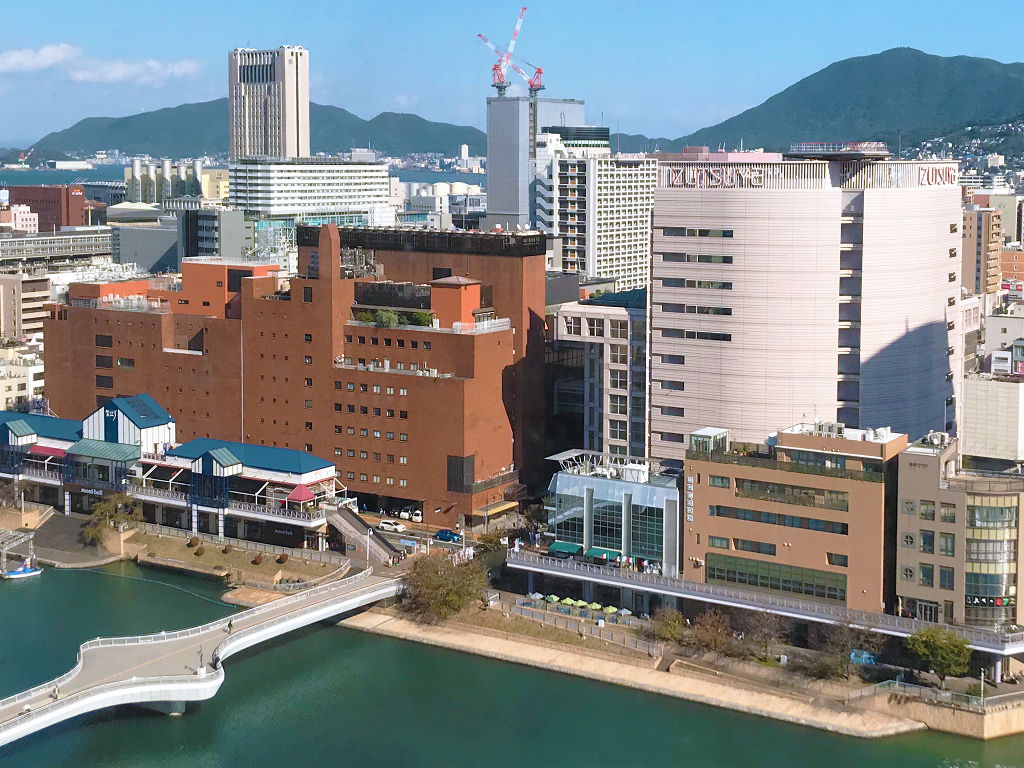 小倉井筒屋本館（左）と新館（右）